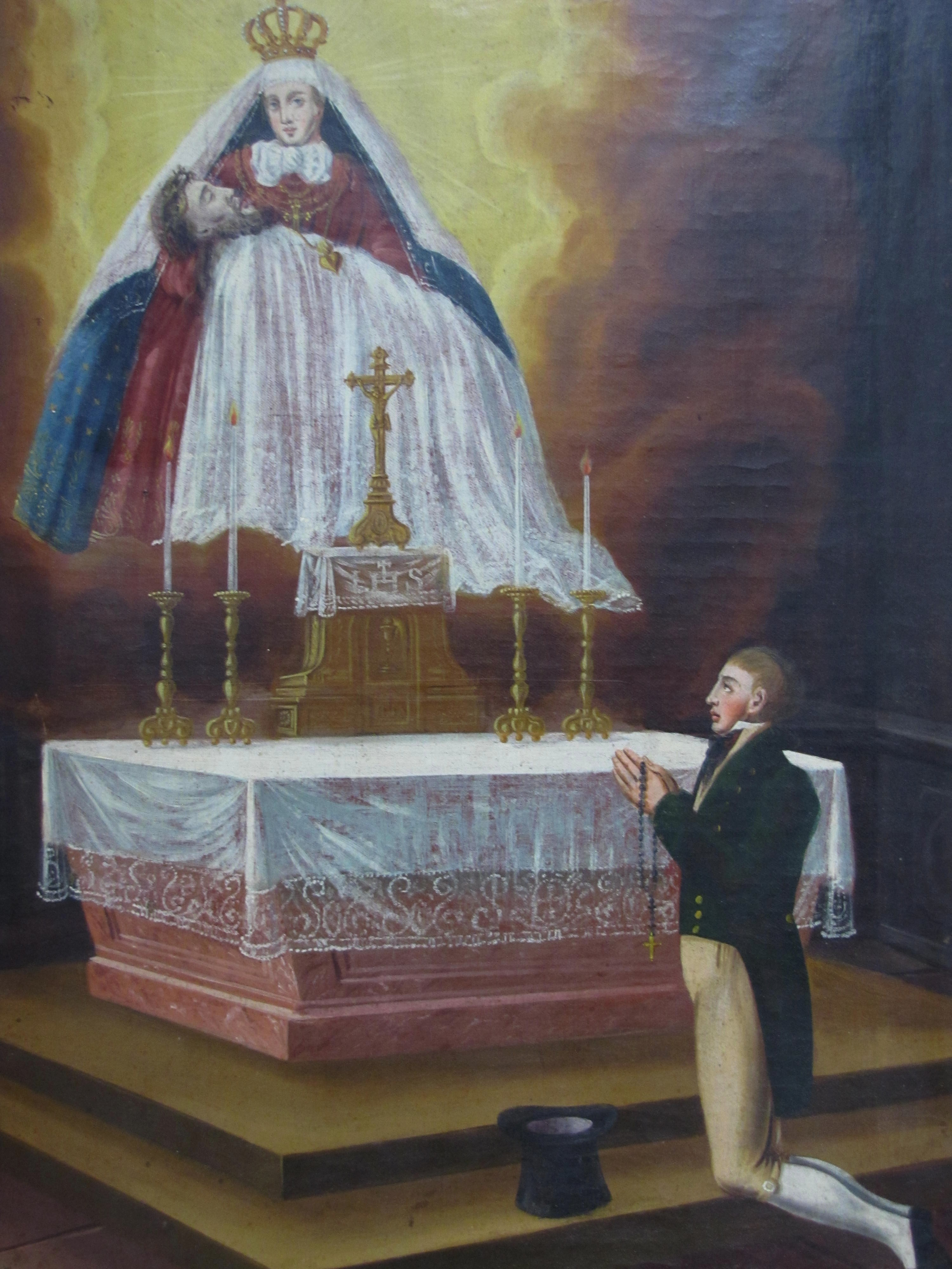 Alsace, Bas-Rhin, Haguenau, Basilique Notre-Dame-des-Douleurs de Marienthal (ancien Prieuré des Guillemites) (IA00062022). Ex-voto (1825)